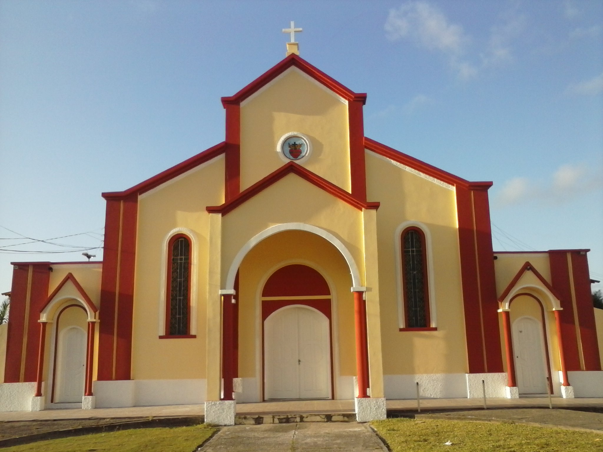 Fachada da Igreja Matriz Sagrado Coração de Jesus (Bragança-PA)